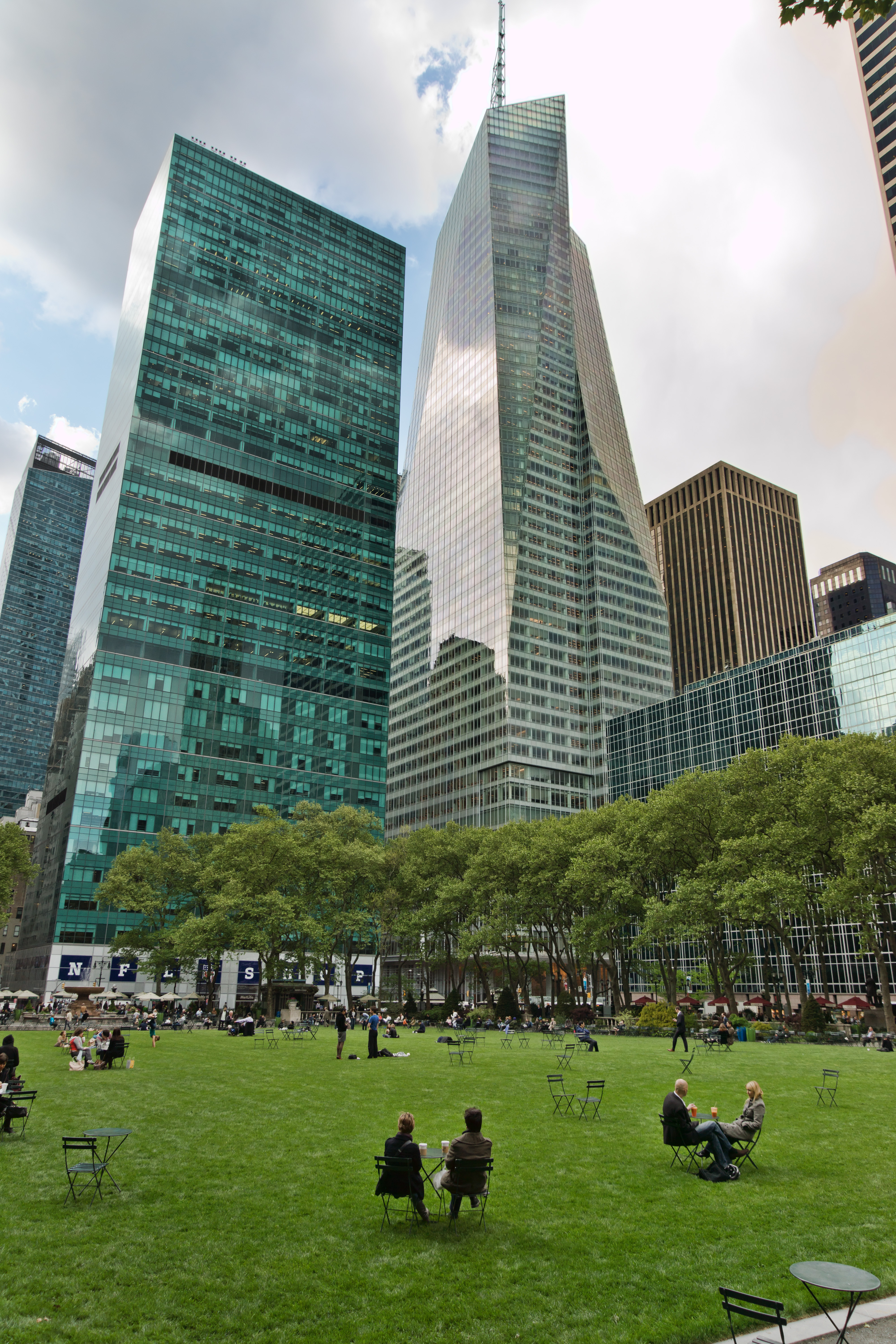 NYC - Bryant Park - Vers la sixième avenue